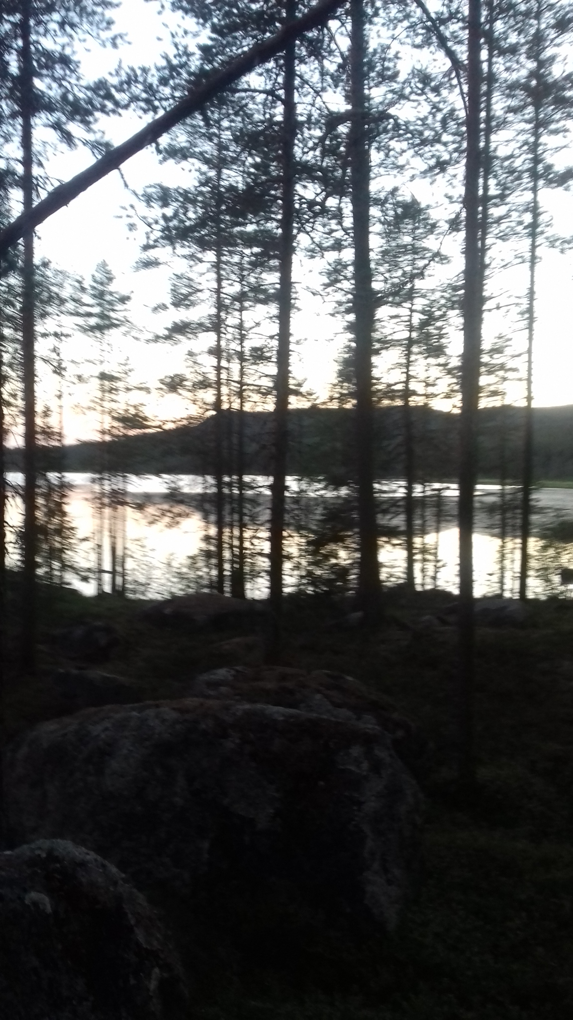 Solnedgång över Angsjön, Björnlandets Nationalpark.